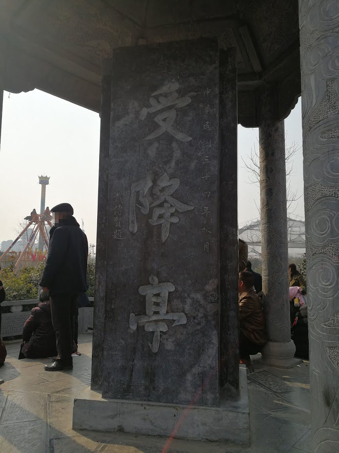 受降亭内的主碑